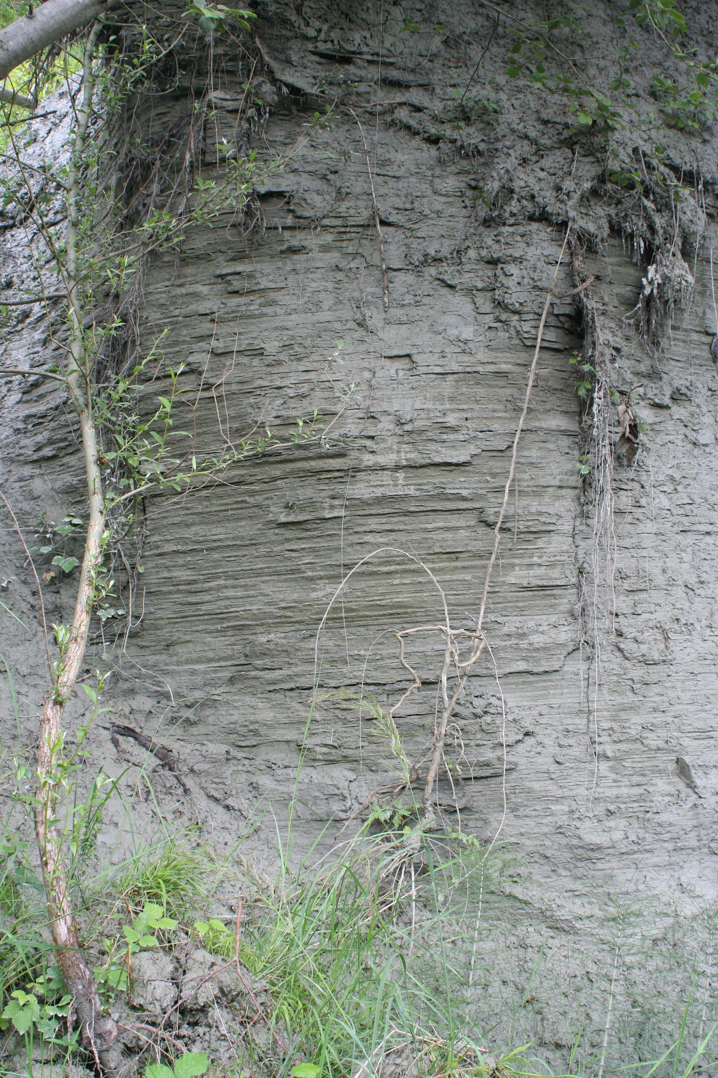 Pleistozäner Bänderton bei Baumkirchen